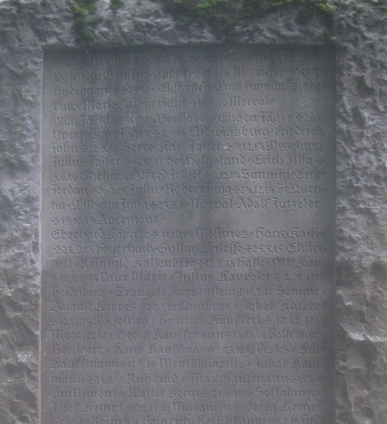 Alter Friedhof (Ludwigsburg), Kriegerehrenmal 1914/18, Rückseite der 1. Stele rechts vom Erzengel Michael.